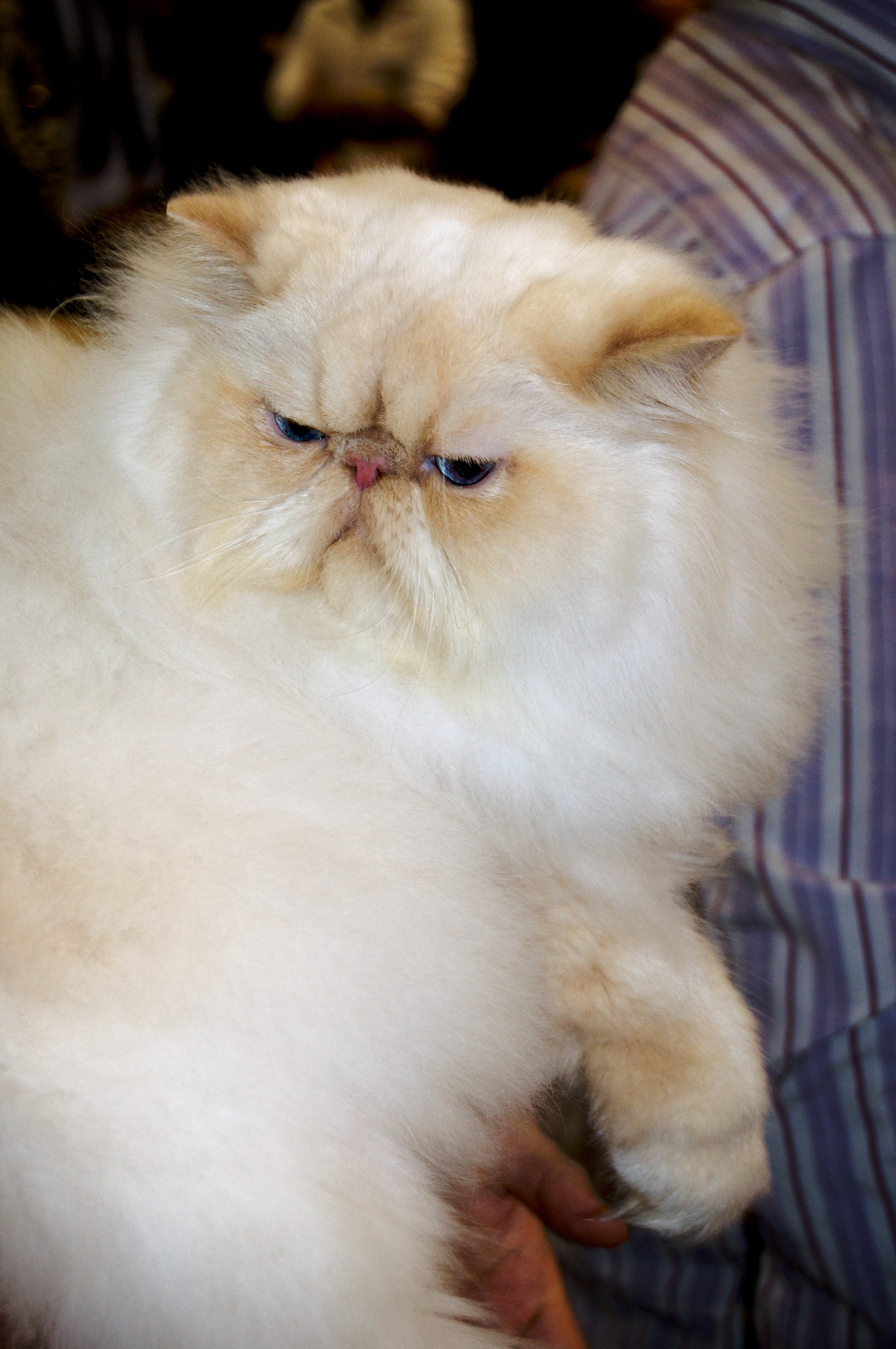 Gatto Persiano - Mostra felina Magnificat